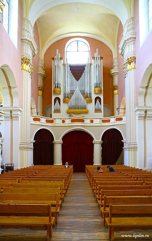 Полацк. Сафійскі сабор. Хоры